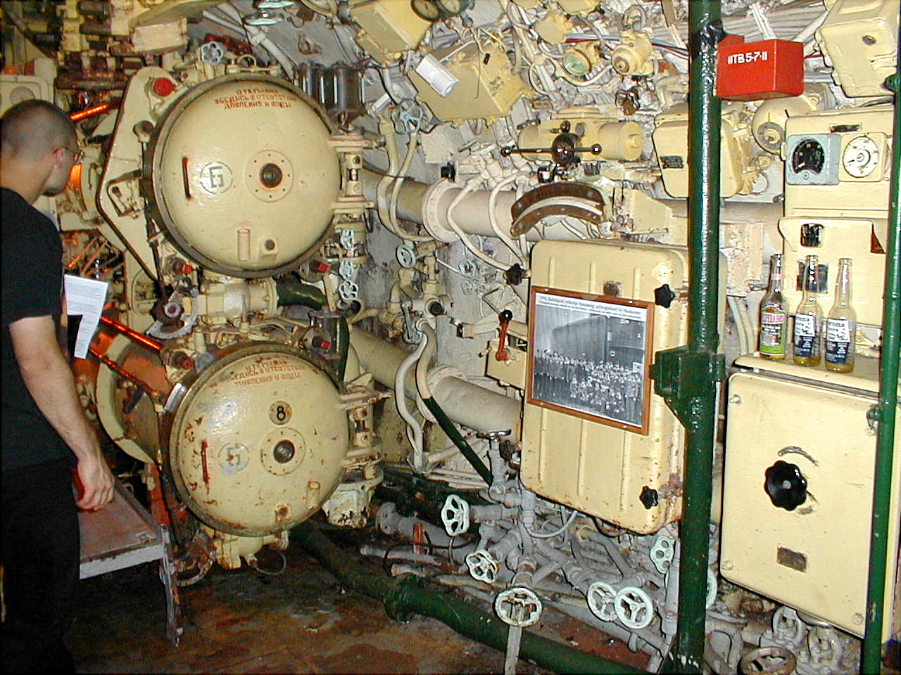 Sous marin conventionnel Russe de classe FoxTrot ici FoxTrot 480 servant de musée et amarré à Zeebruges